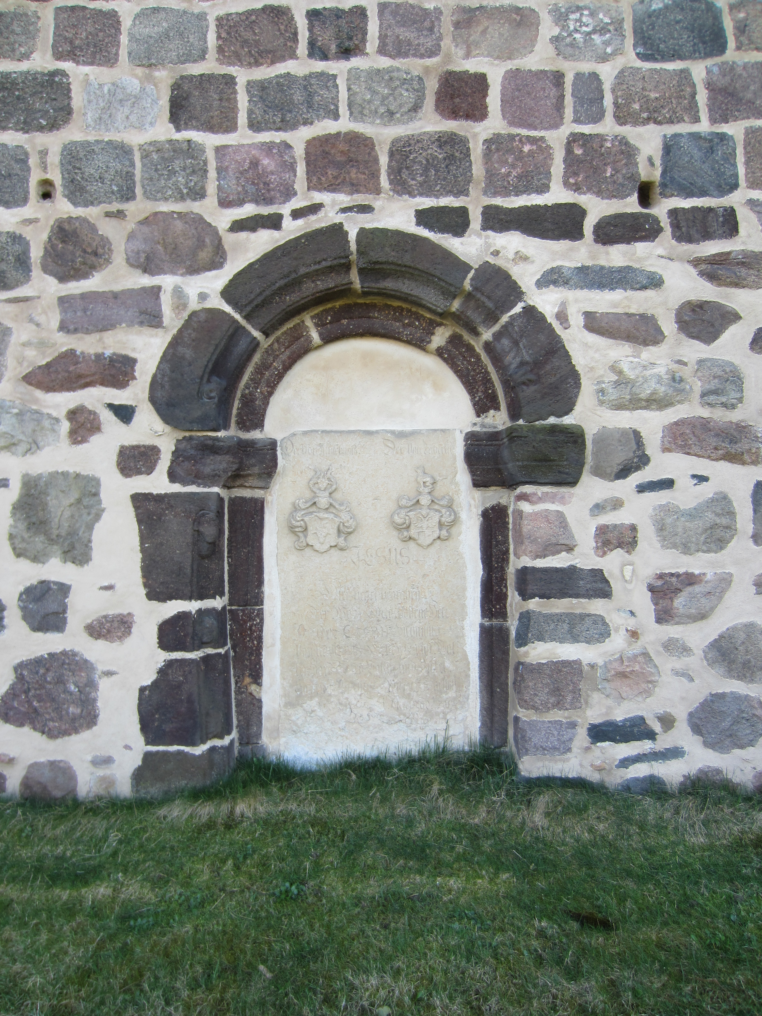 Waltersdorf, Gemeinde Heideblick, denkmalgeschützte Dorfkirche, romanisches Nordportal mit Grabstein des Caspar Siegismund von Muschwitz († 1708)